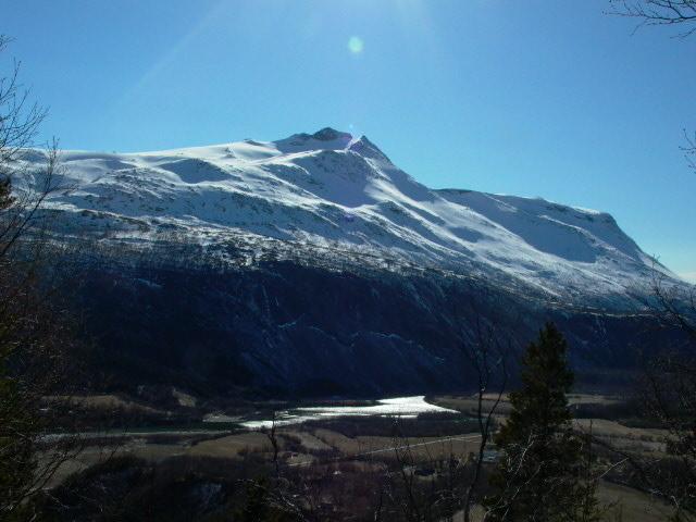 Høgtind i Beiarn i Nordland, 1405 m.o.h., sett fra nordøst ved Kvælgarden